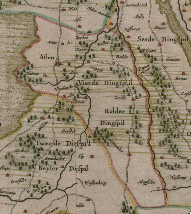 Oude kaart van Drenthe uit 1634 (fragment)